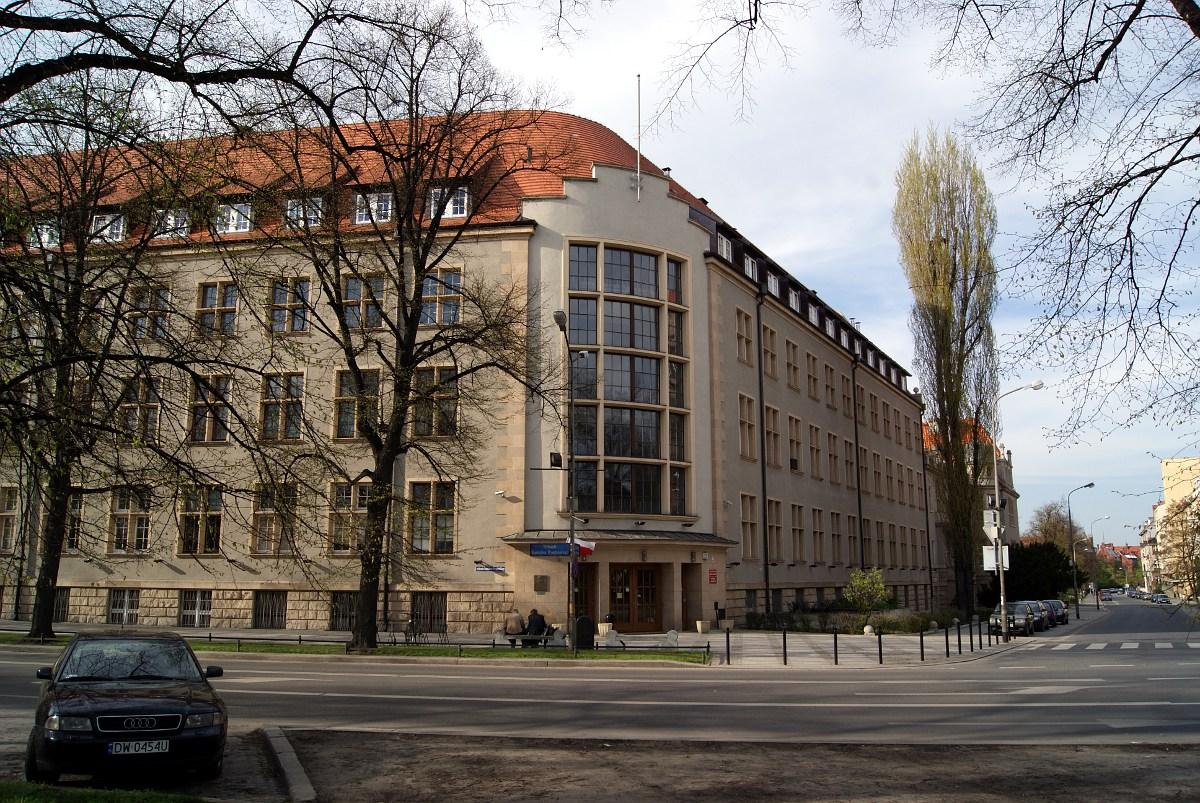 Politechnika Wrocławska - budynek A2 Wdział Chemiczny.